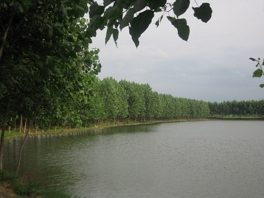 روستای دونه سر بابل